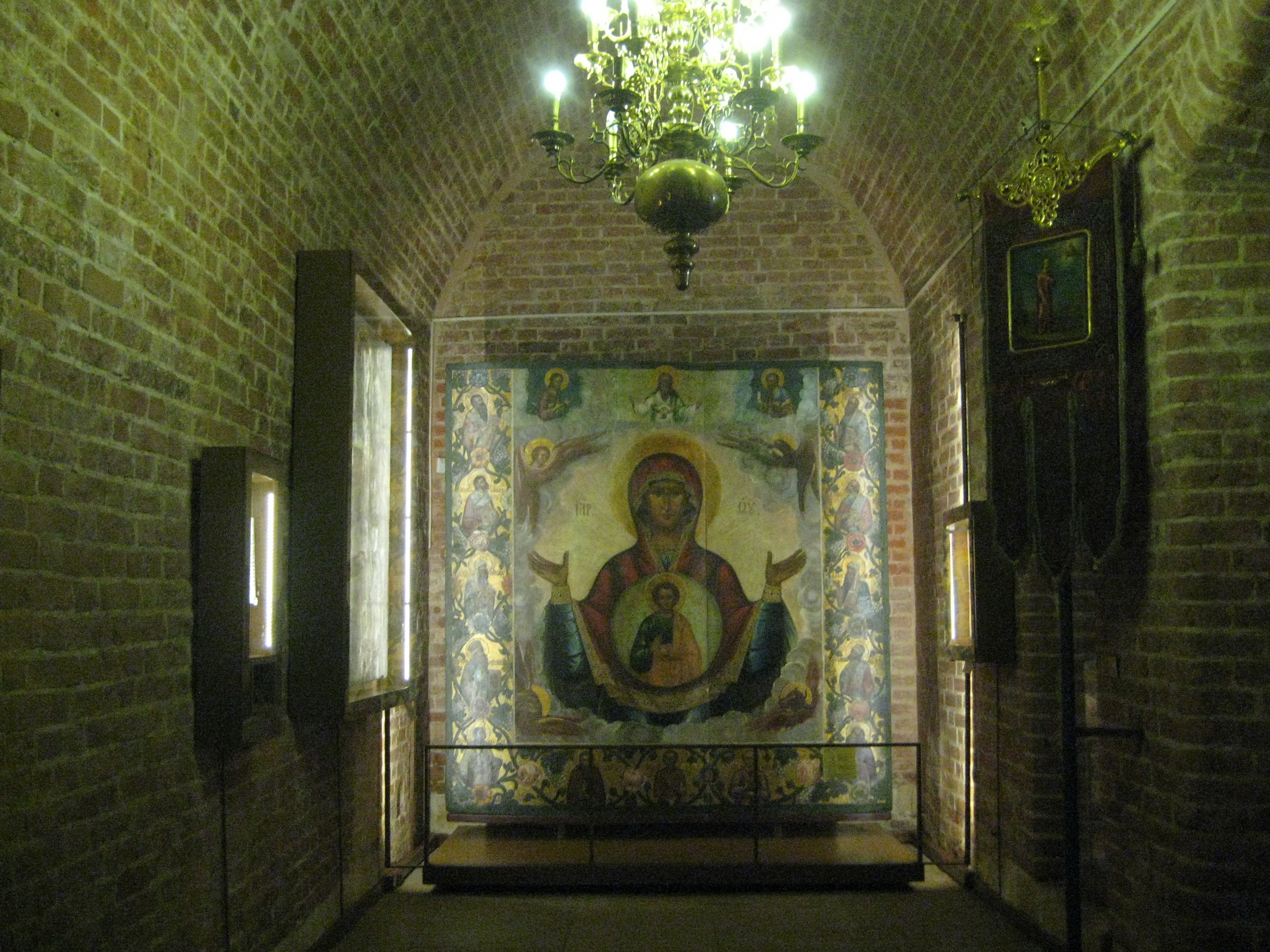 Богоматерь Знамение. 1780-е. В 18-19 вв. находилась над входом в придел св. Василия Блаженного Реплика фасадной иконы, расположенной на восточной стене собора. Левый ряд (сверху вниз): Василий Великий, Иоанн Златоуст, св. Петр, св. Иона Правый ряд (сверху вниз): Григорий Богослов, Николай Чудотворец, св. Алексей, св. Филипп Нижний ряд (слева направо): Стефан Мученик, Варлаам Хутынский, Василий Блаженный, Сергий Радонежский